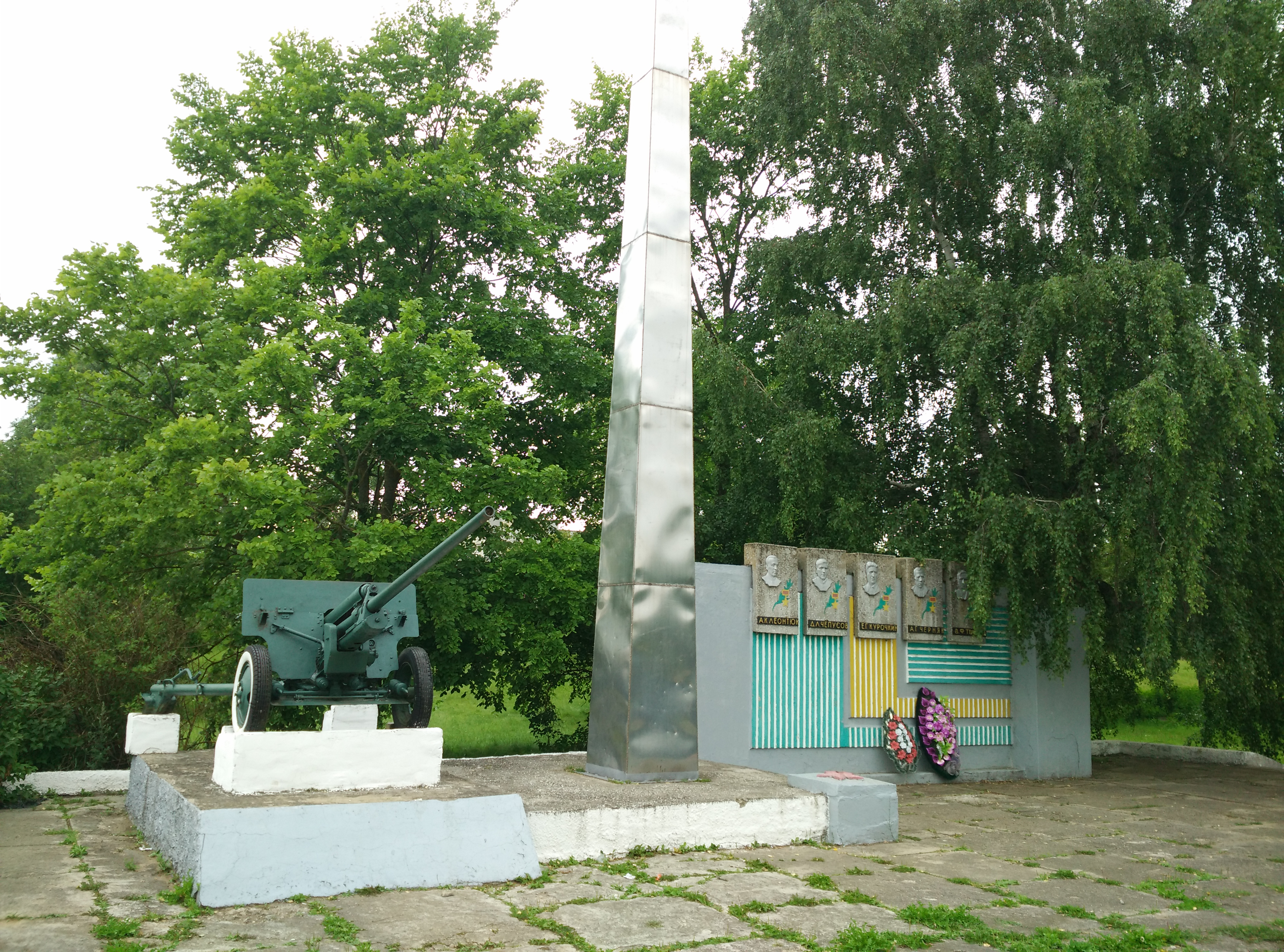 Вёска Узляны, Пухавіцкі раён.